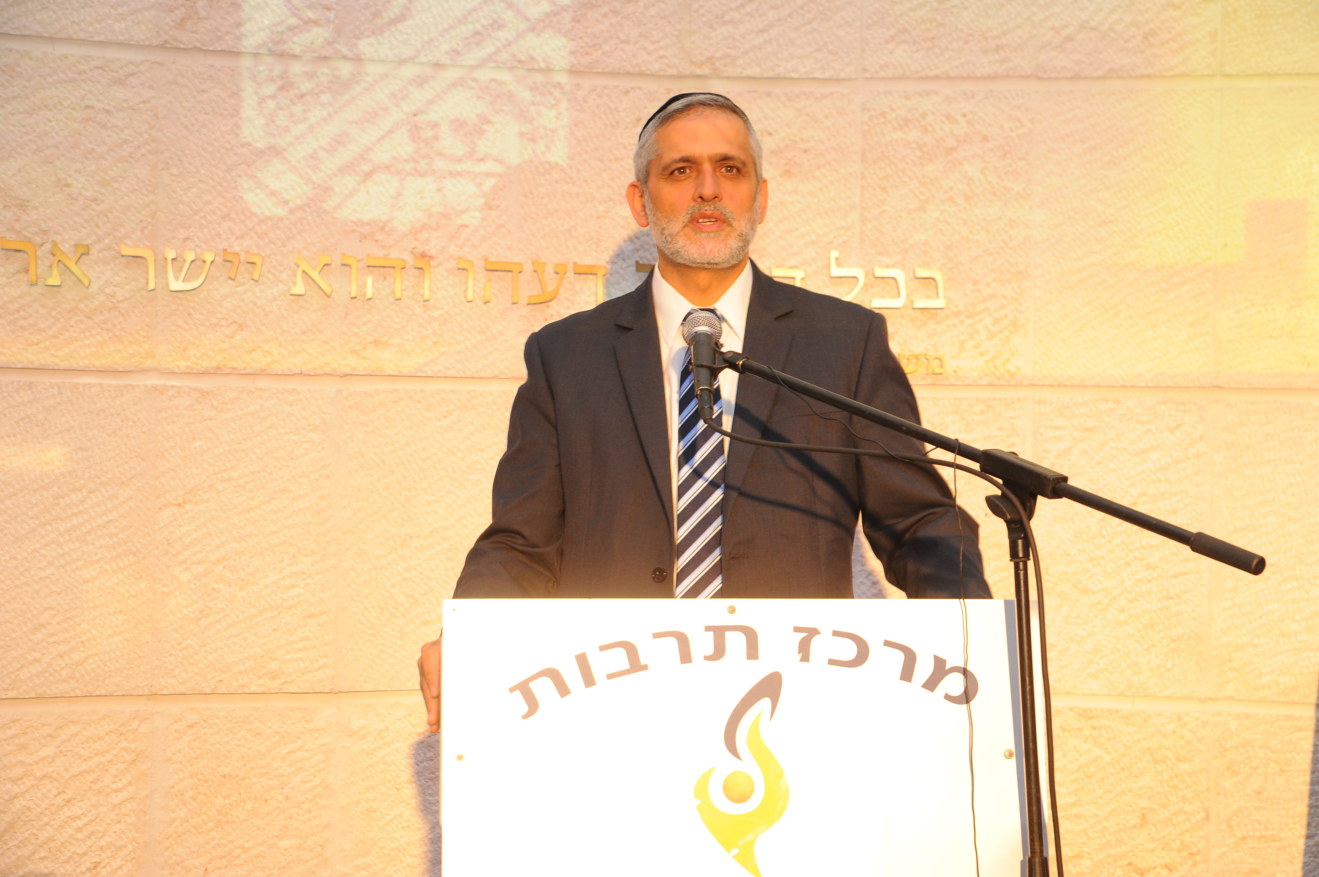 אלי ישי נואם בטקס חנוכת בית צבי מיתר ביד בנימין